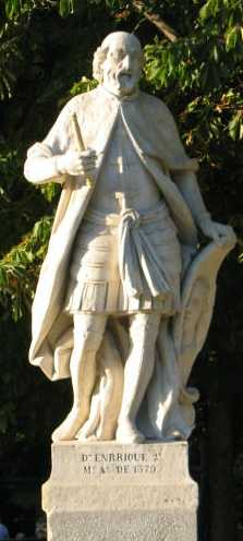 Estatua de Enrique II de Castilla en el Parque del Retiro de Madrid. Tiene su estatua en el Paseo de la Argentina, esculpida en piedra blanca por Philippe Boiston entre 1750 y 1753. Al nombre que figura en el plinto le sobra una R, debería escribirse Enrique. Foto tomada por Sanbec.